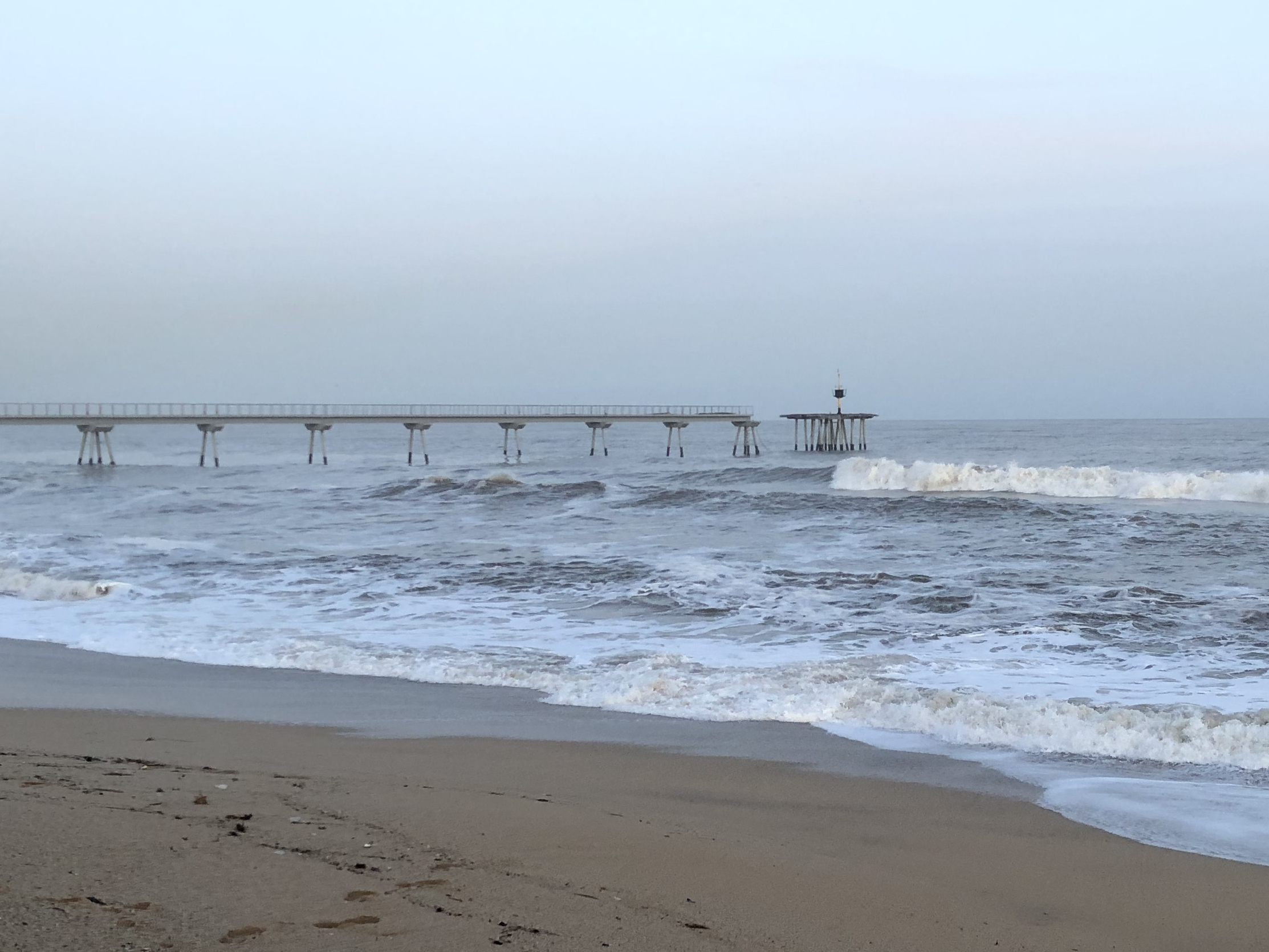 Estat del pont del Petroli de Badalona després de sofrir els efectes del temporal Glòria, en el mes de gener de 2020.